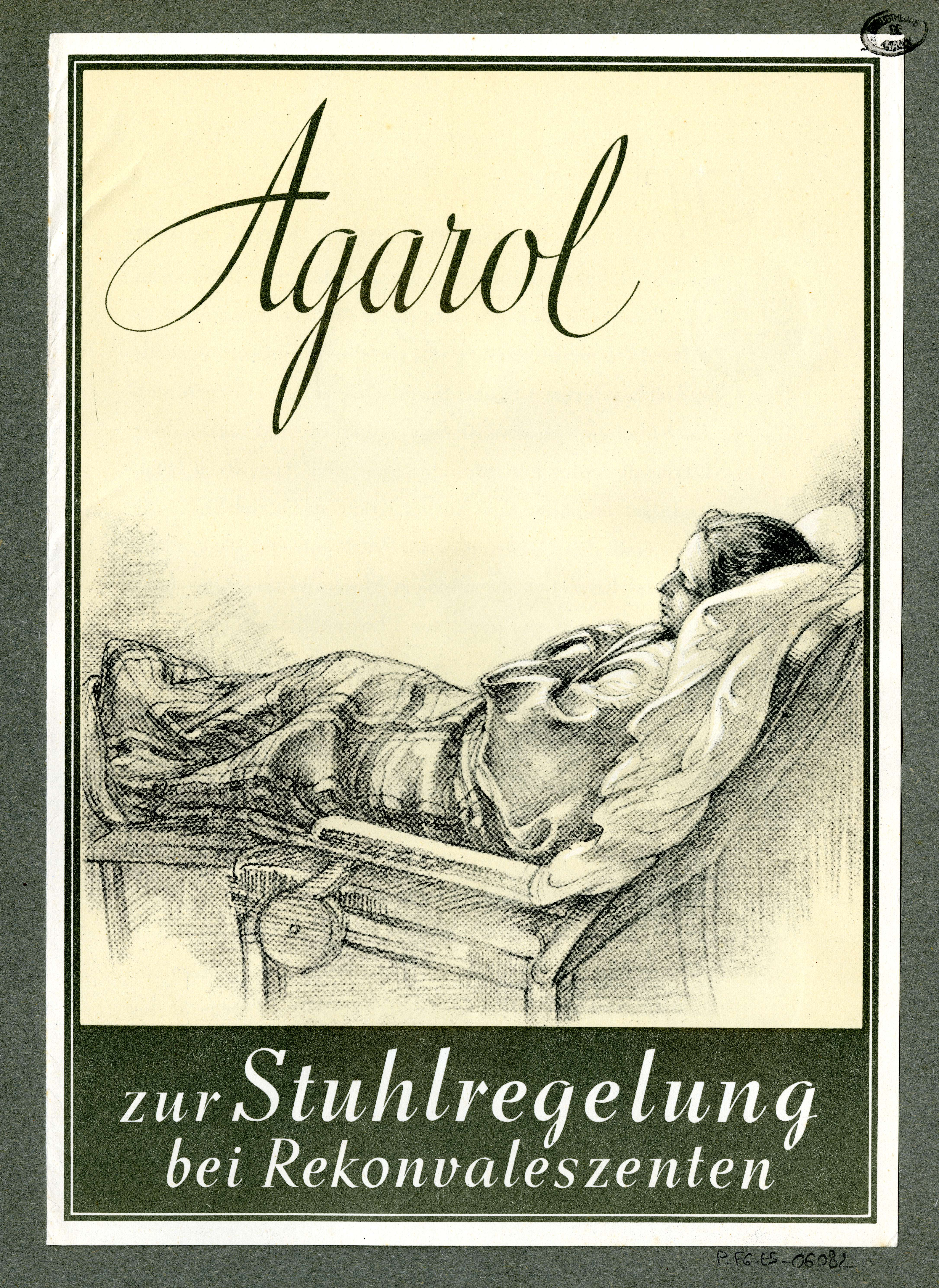 Date incertaine